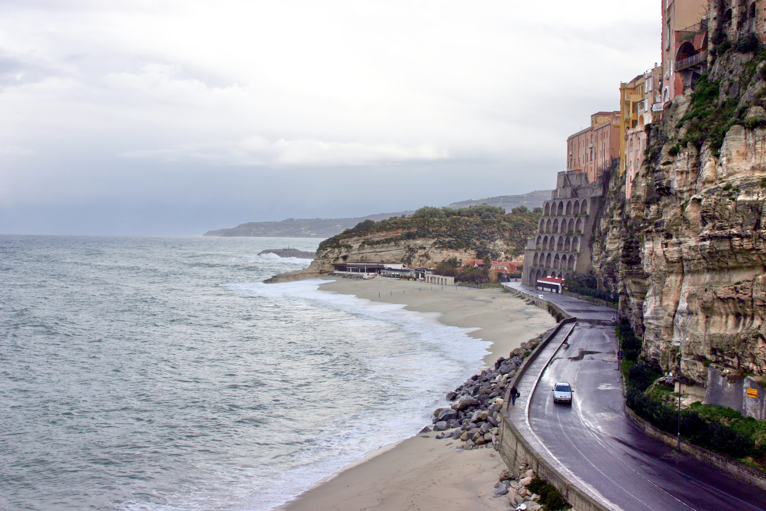 Vistas de Tropea